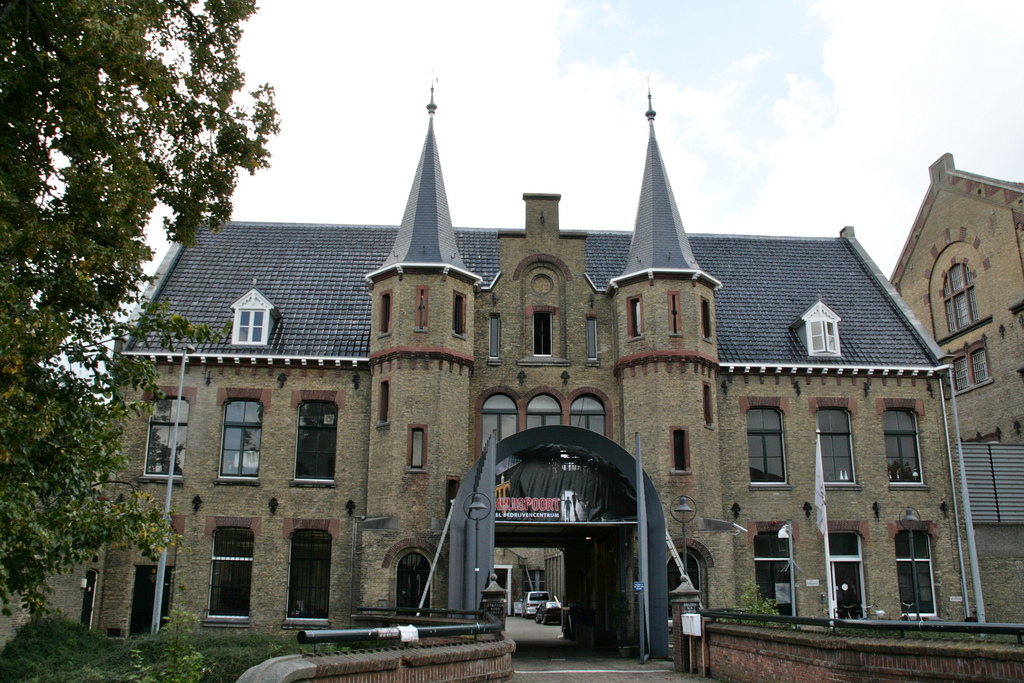 (voorm. Huis van Bewaring), Blokhuisplein 40, Leeuwarden